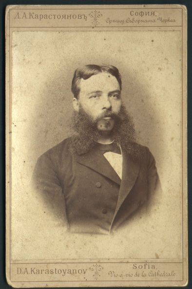 Български Георги Странски (1847-1904) е български лекар, революционер и политик. Deutsch Georgi Stranski (1847-1904) war ein bulgarischer Arzt, Revolutionär und Politiker English Georgi Stranski was Bulgarian politician, foreign minister of Bulgaria from 1. September 1887 until 16. Juni 1890